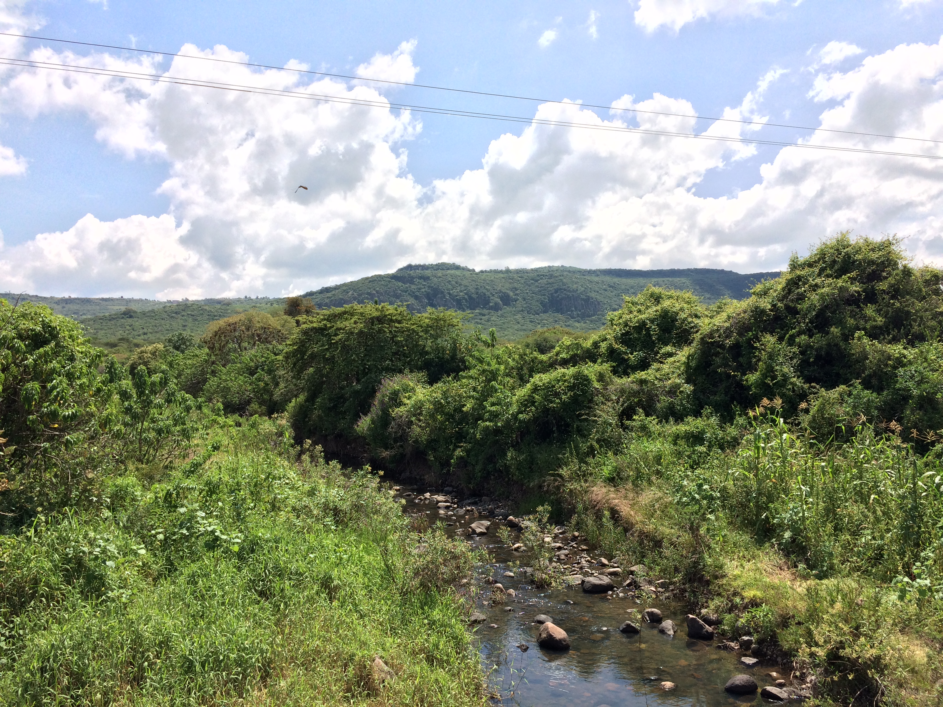 VISTA DEL ARROLLO Y LAS PEÑAS